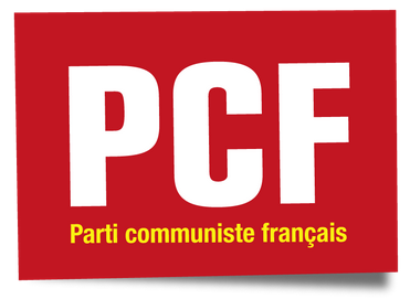 Logo du PCF en 2013